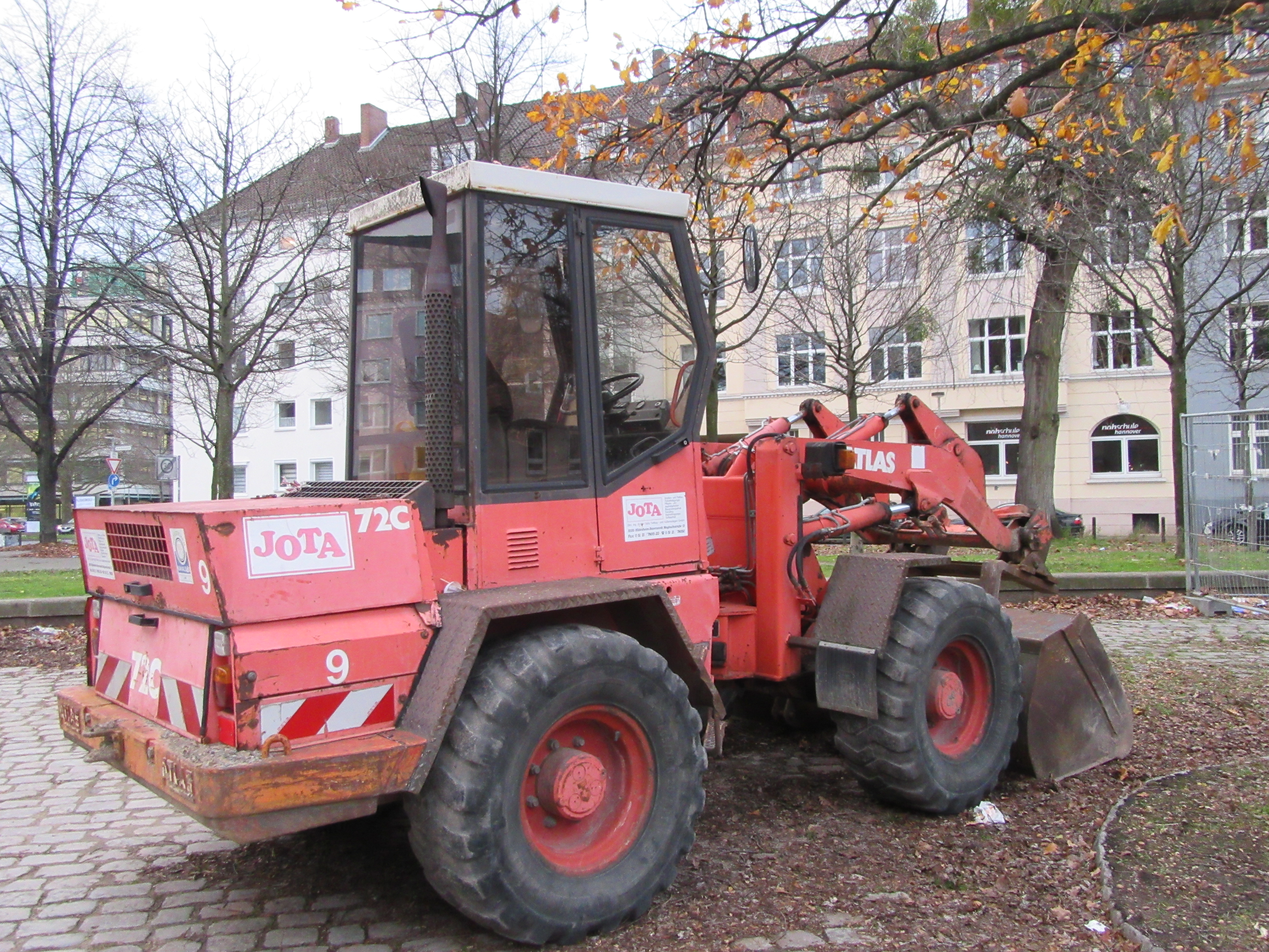 Radlader AR 72C der Marke Atlas